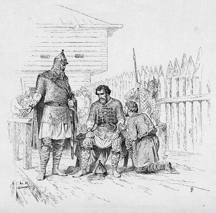 Великий Князь Ярополк 972-980 г. Старший сын Святослава, Ярополк, отняв удел брата своего Олега, захватил и удел Владимира. Последний спасся бегством и завладел впоследствии Киевским престолом. При осаде города Родни, Ярополк, не вняв мольбам верного Варяжко, склонился на увещевание воеводы Блуда, предательски уговорившего его сдаться на милость Владимиру.